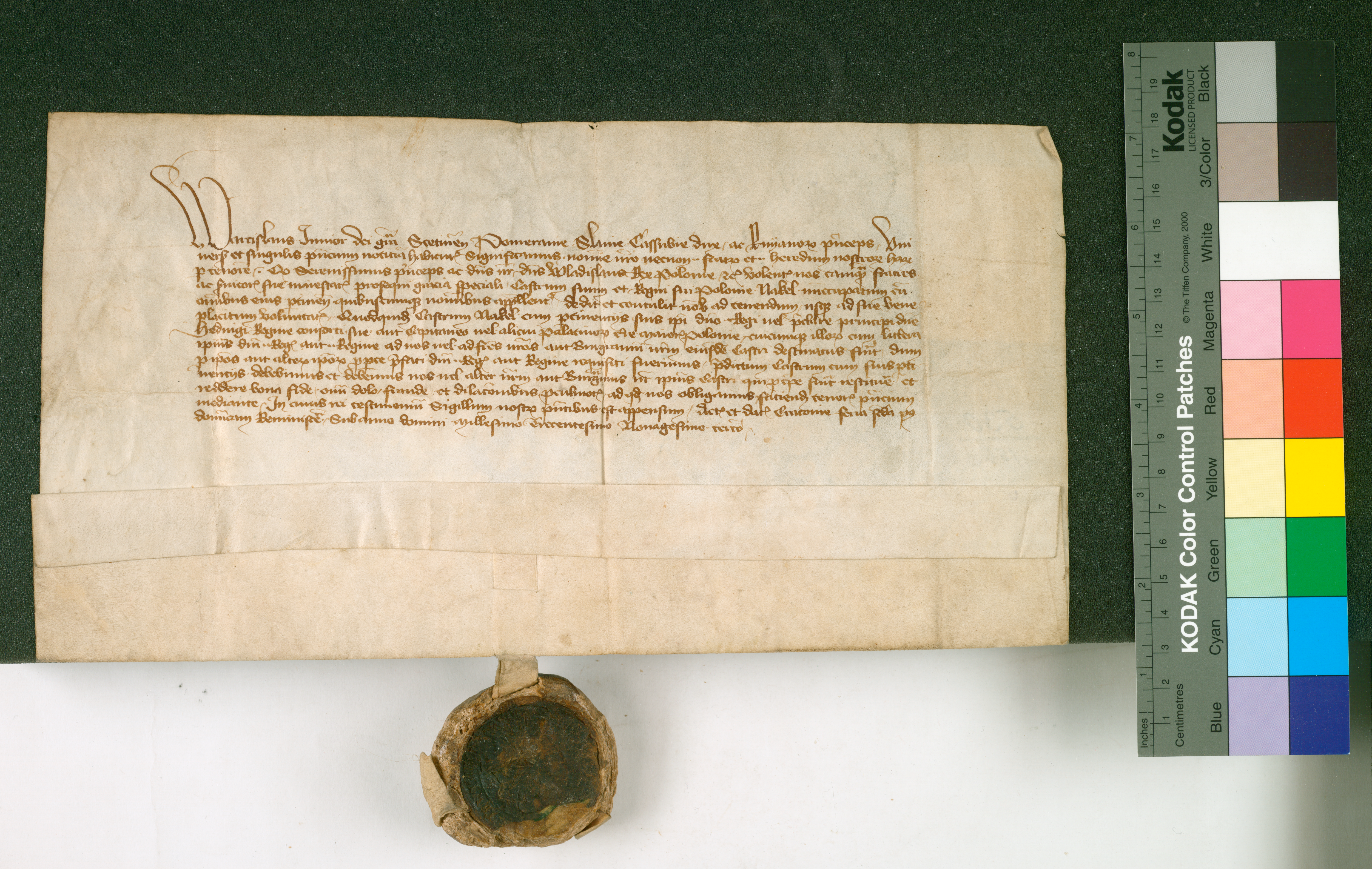 Warcisław młodszy, książę szczeciński, otrzymuje od Władysława Jagiełły, króla polskiego, gród Nakło, zobowiązuje się go zwrócić na żądanie.